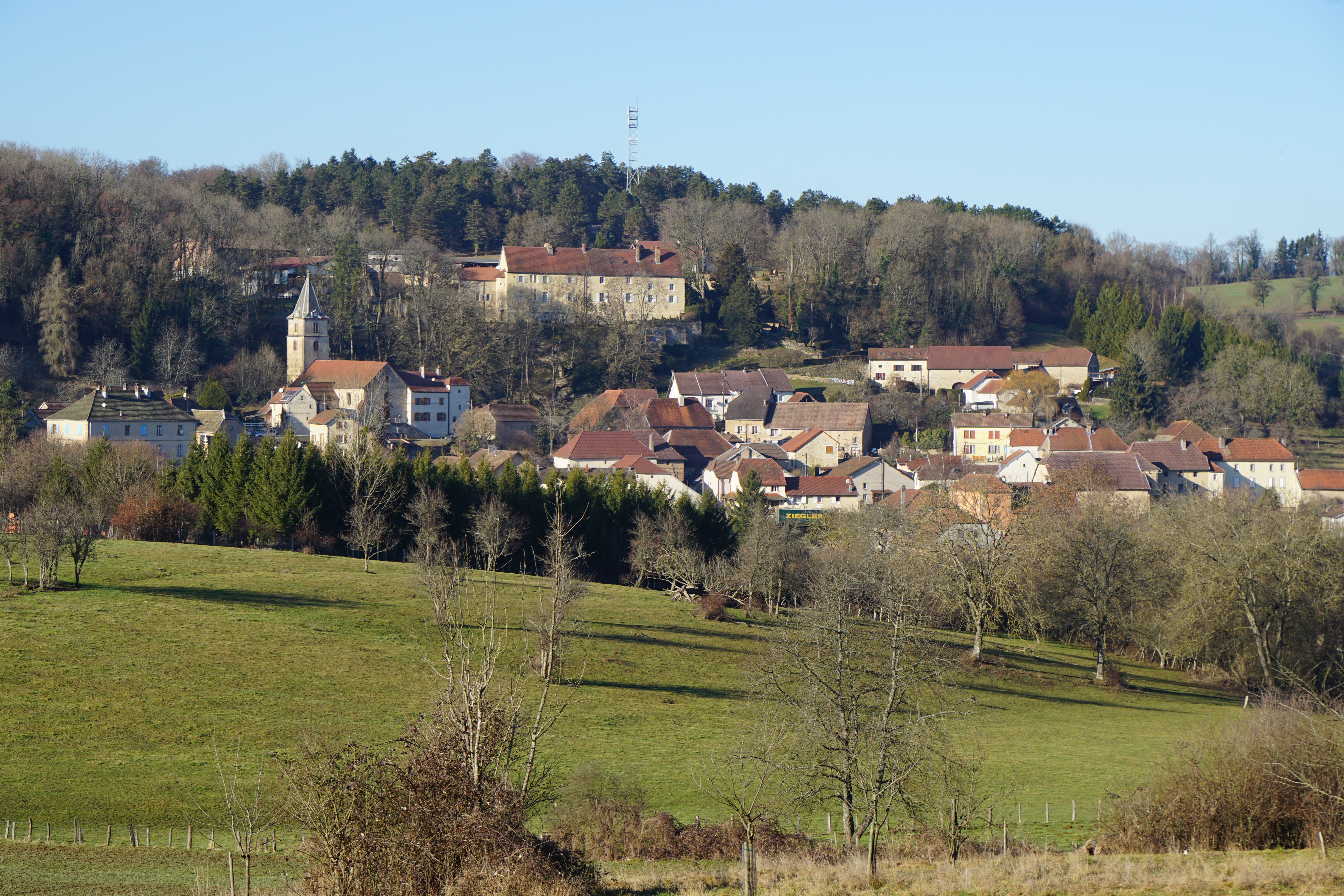 Vue générale de Gouhenans.